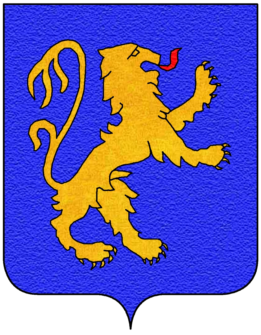 Stemma della famiglia Abiosi